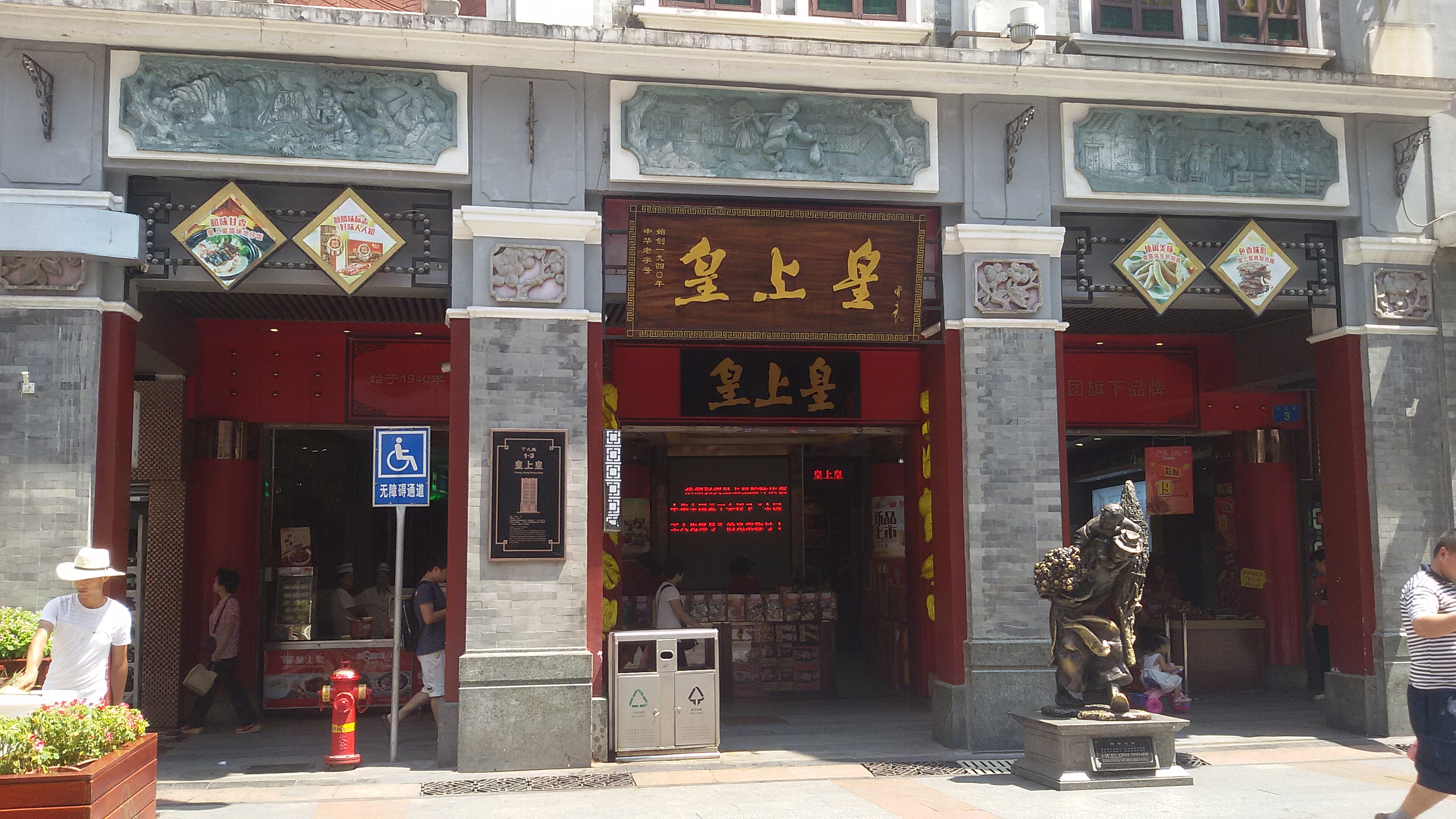 粵語: 皇上皇嘅總部